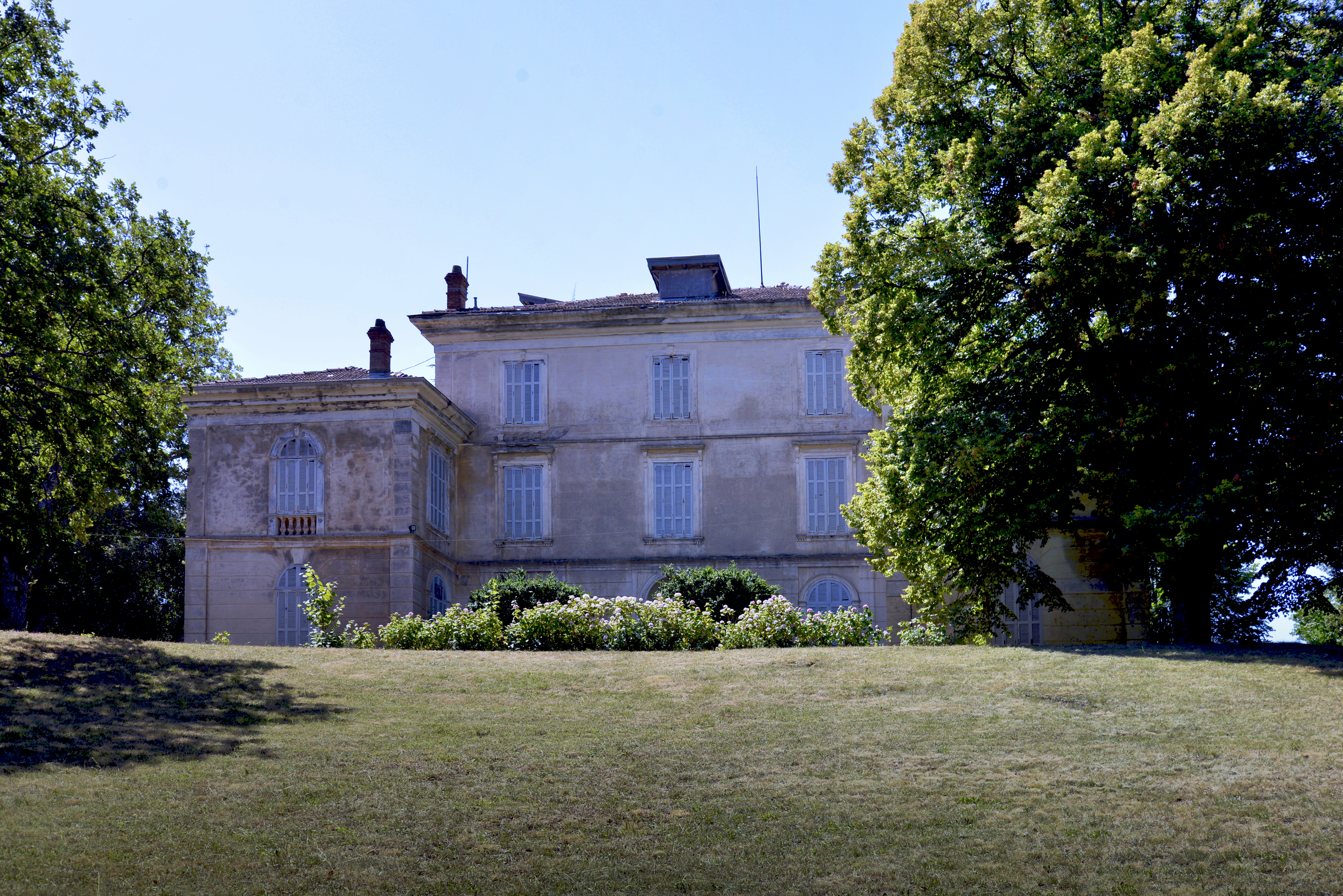 Santo-Pietro-di-Venaco, Centre Corse - Le "château" du comte Pozzo di Borgo de la fin du XIXe siècle. Son jardin est repris à l'Inventaire général du patrimoine culturel.